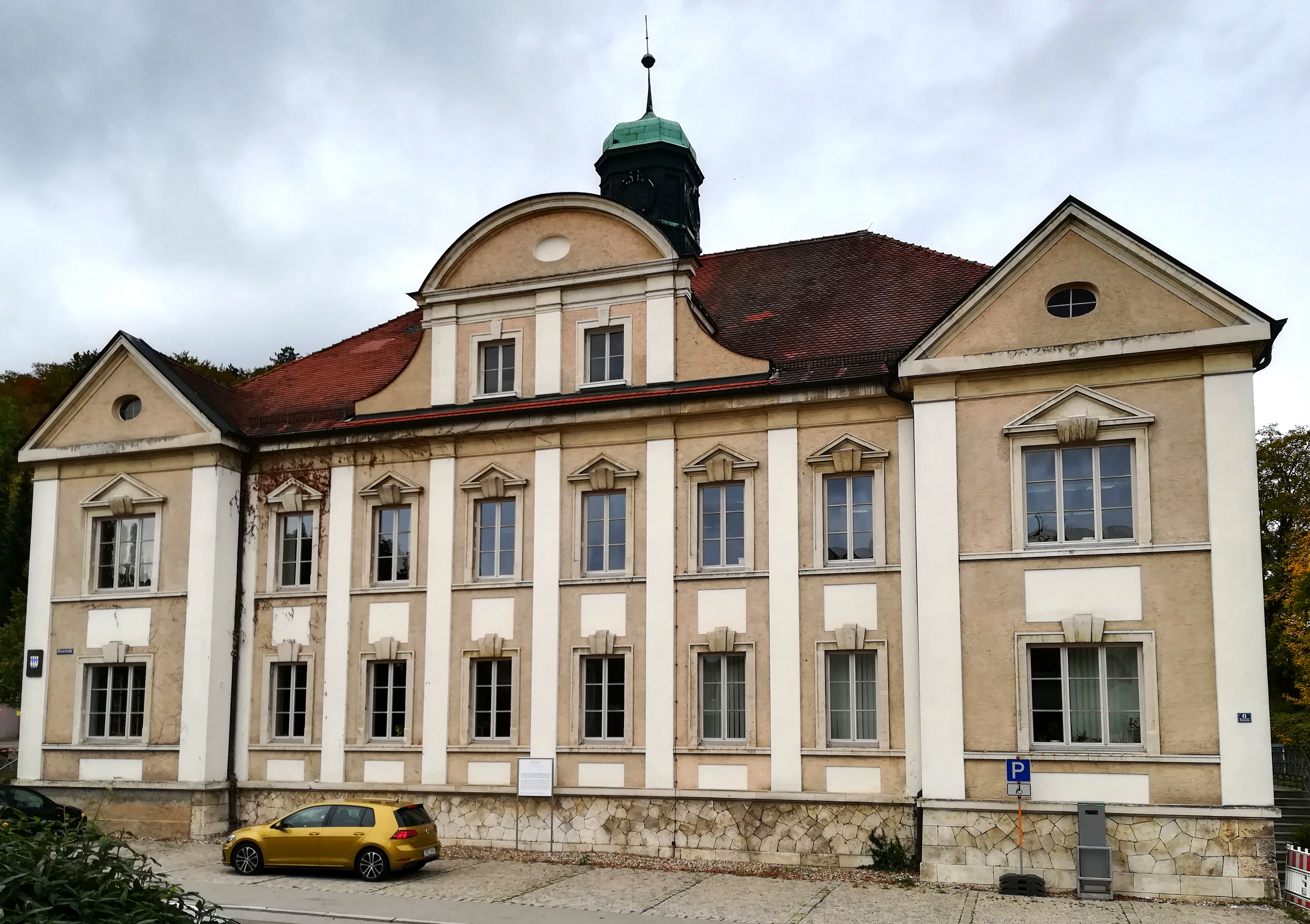 Zweigeschossiger Walmdachbau mit übergiebelten Seitenrisaliten und mittlerem Zwerchhaus, Fassade mit Lisenengliederung, neubarock, 1900